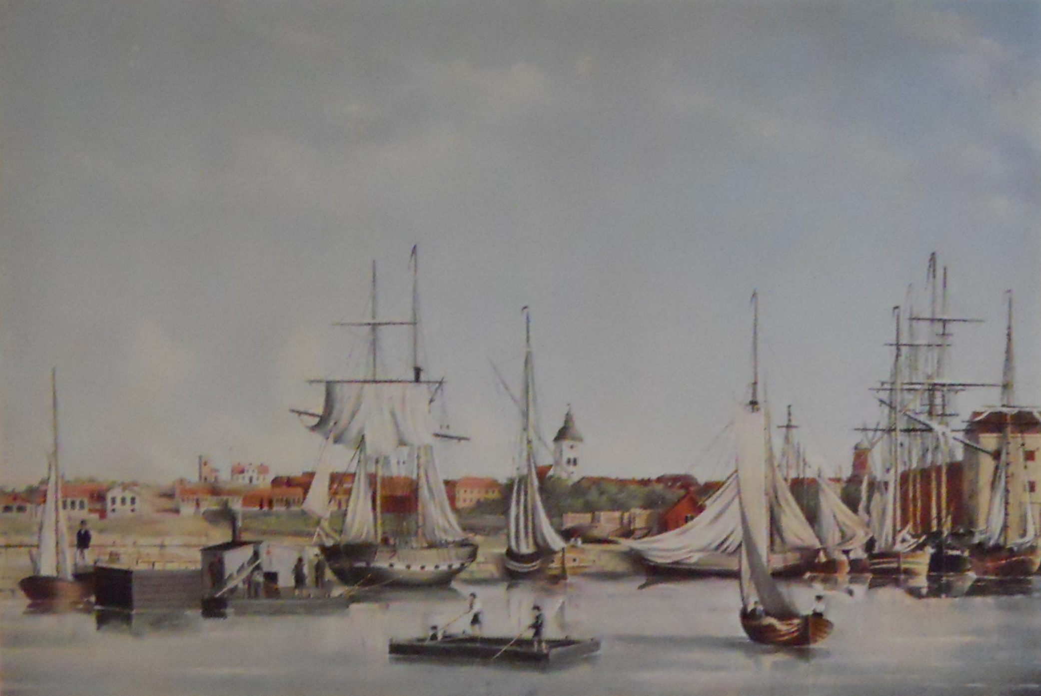 Varbergs hamnlabel QS:Lsv,"Varbergs hamn"